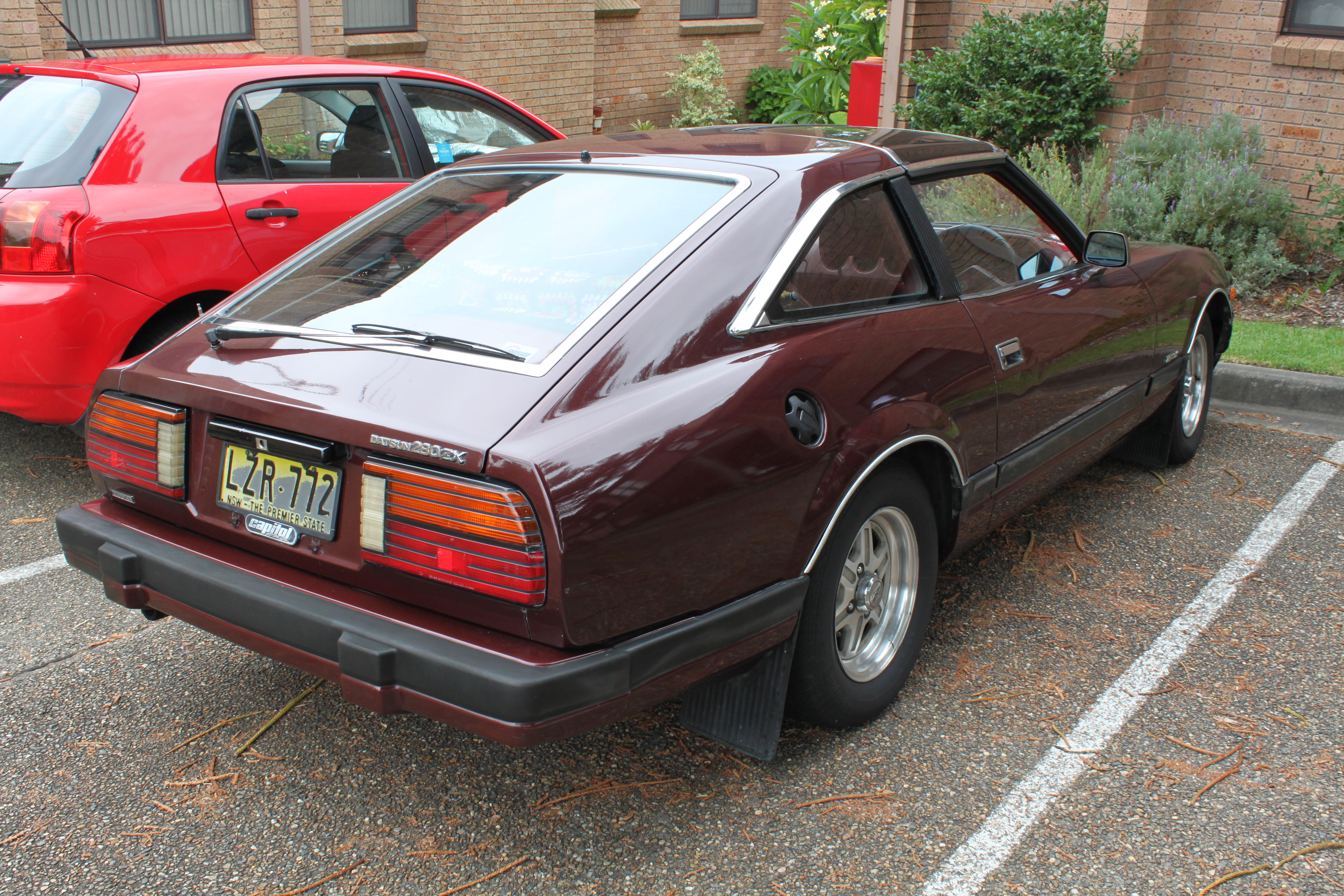 Datsun 280ZX S130